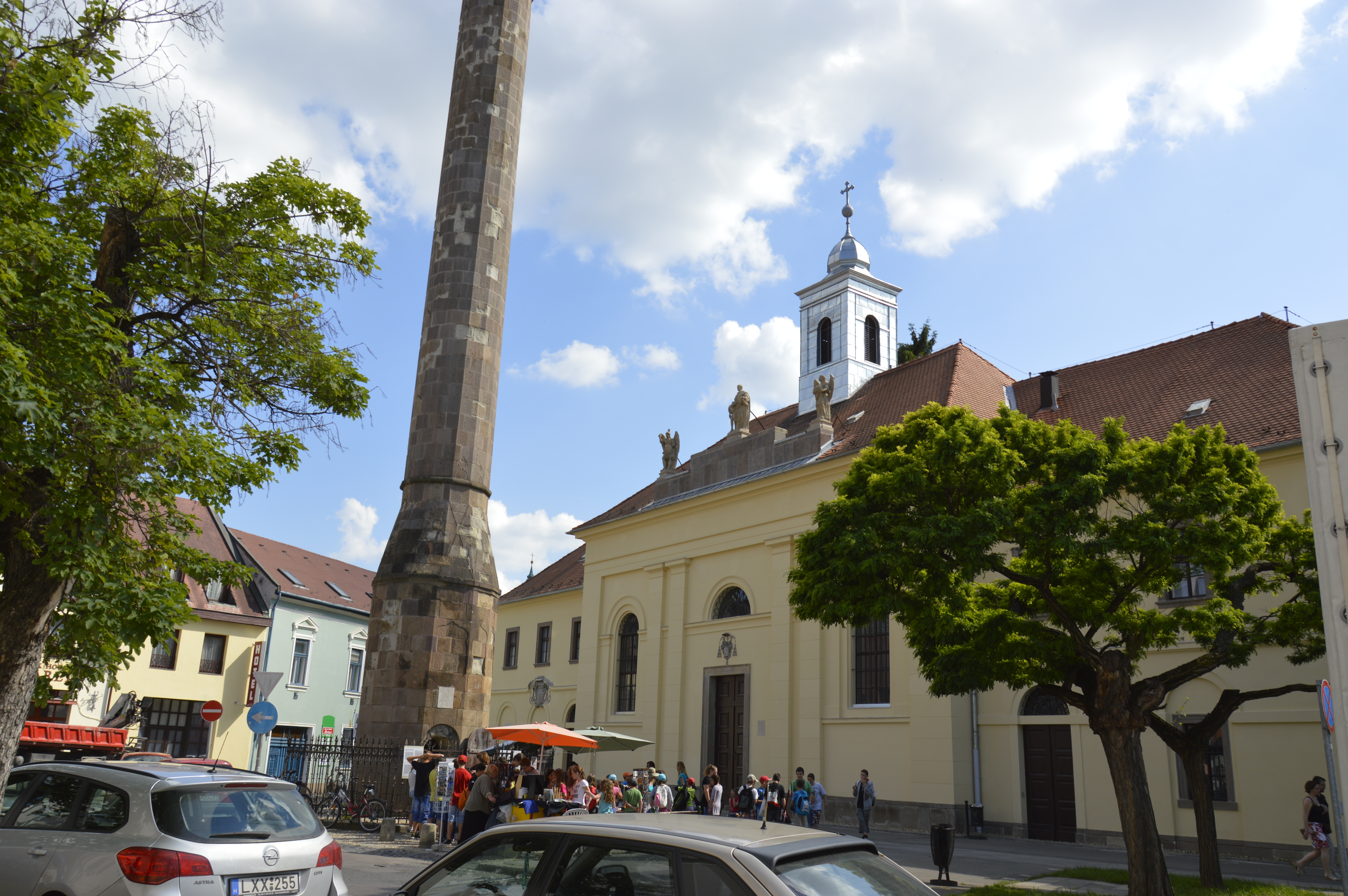 Irgalmasok kápolna